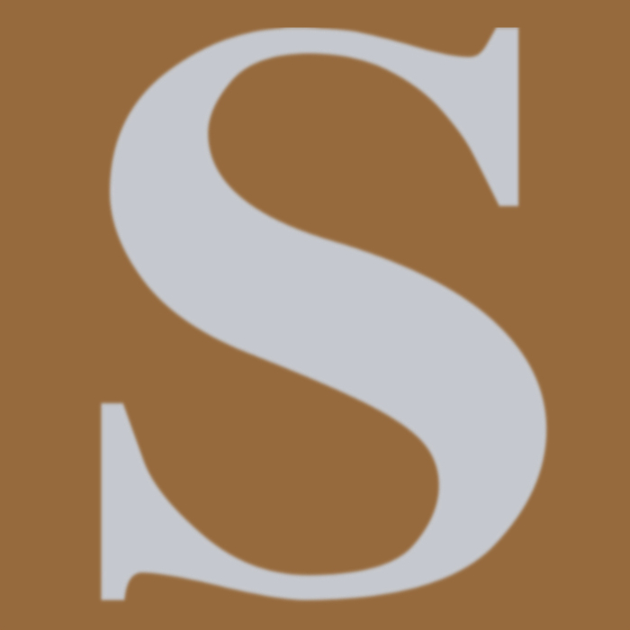 Logo der Gürtellinie der Wiener Stadtbahn in den letzten Jahren ihre Betriebs